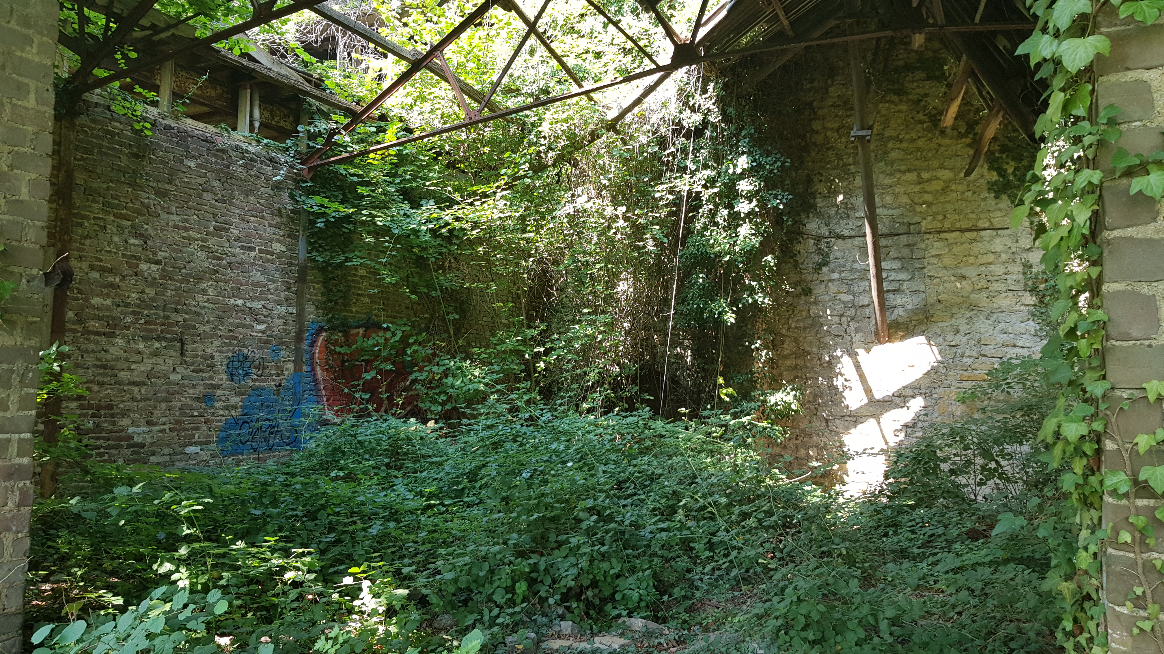 oven VI van Kalkovens Kurvers, Ubachsberg, Nederland